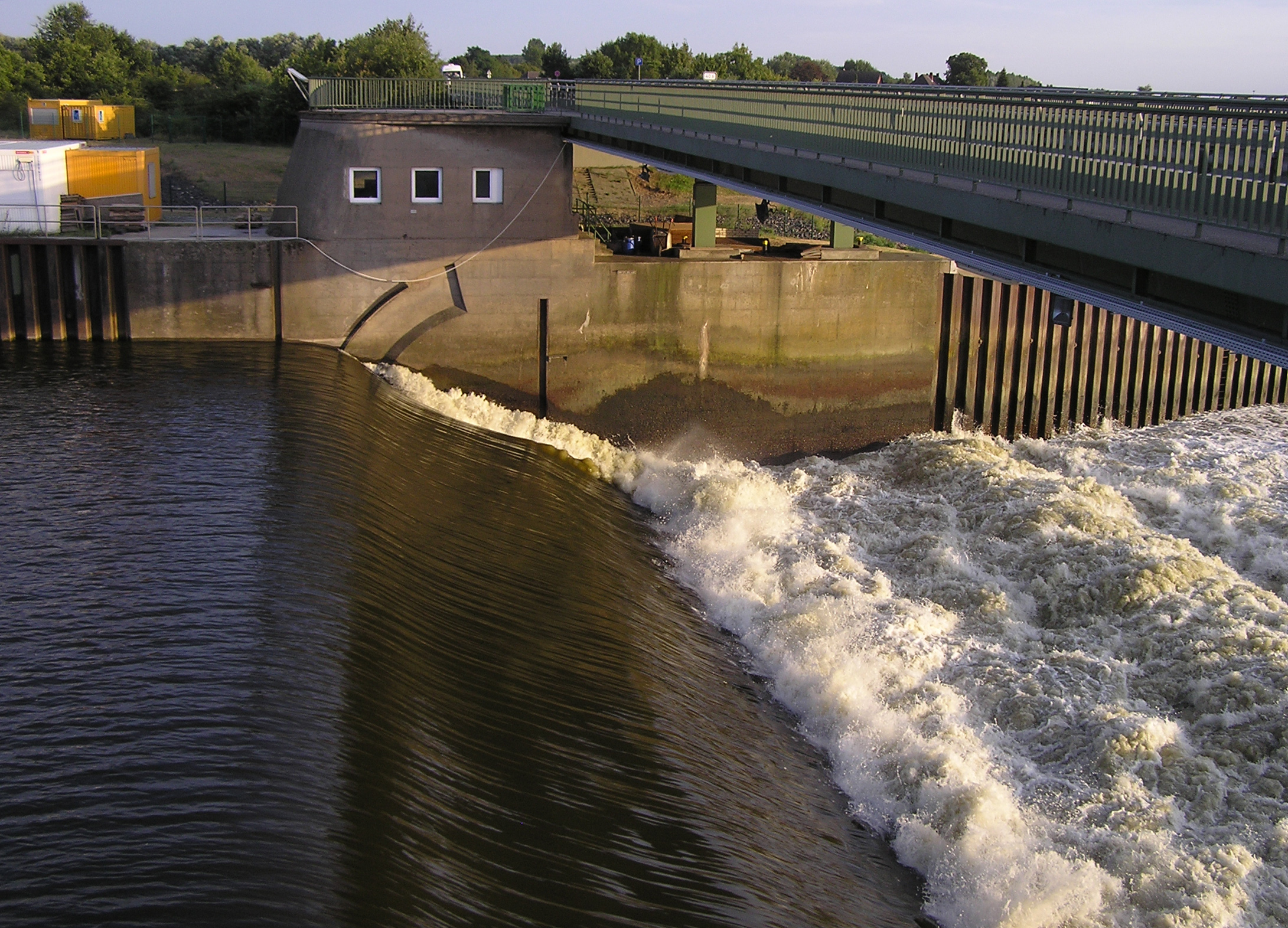 Staustufe Geesthacht mit Brücke der B 404 über die Elbe.